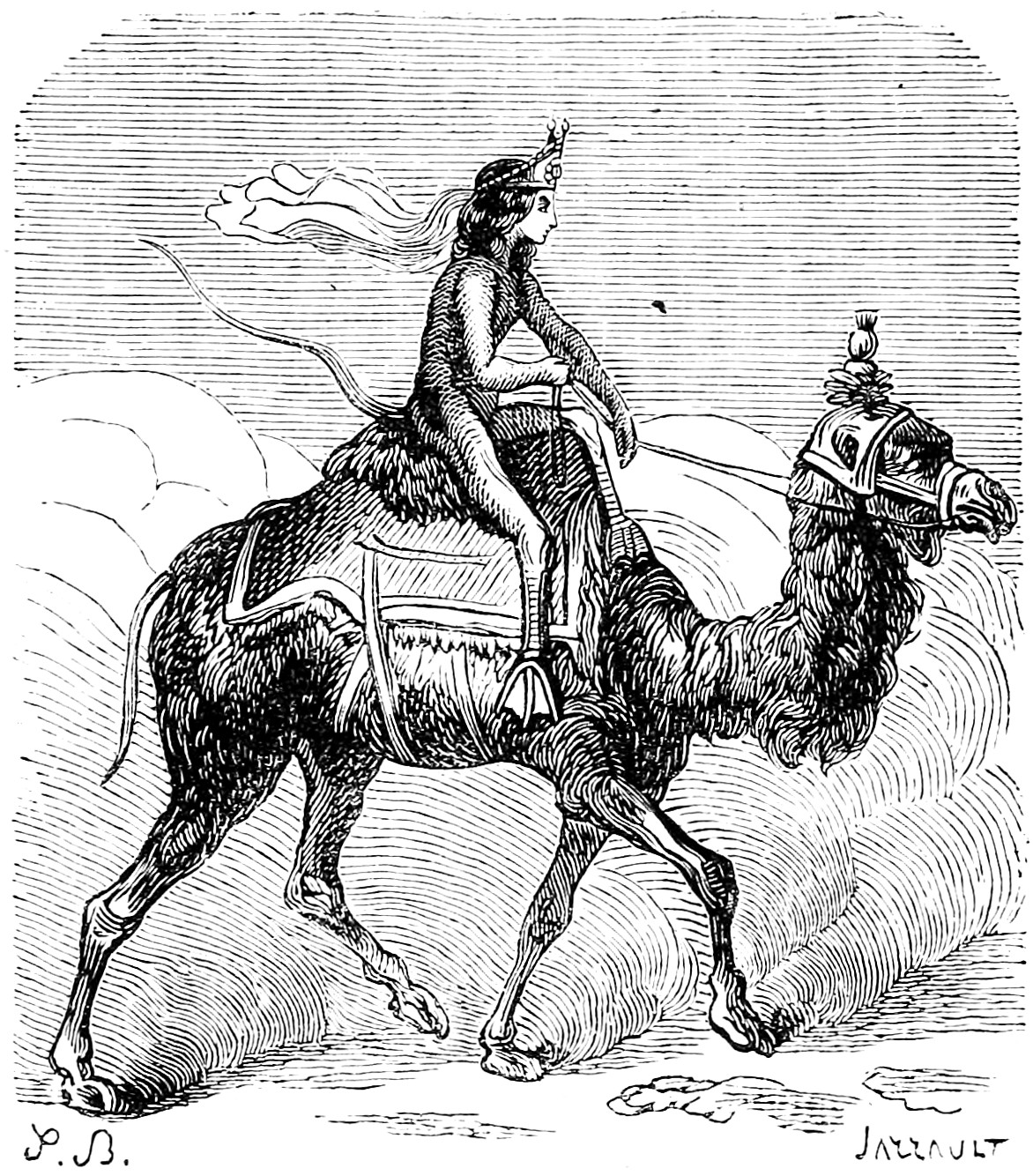 Illustration du Dictionnaire infernal par Louis Le Breton, 6eme édition, 1863.